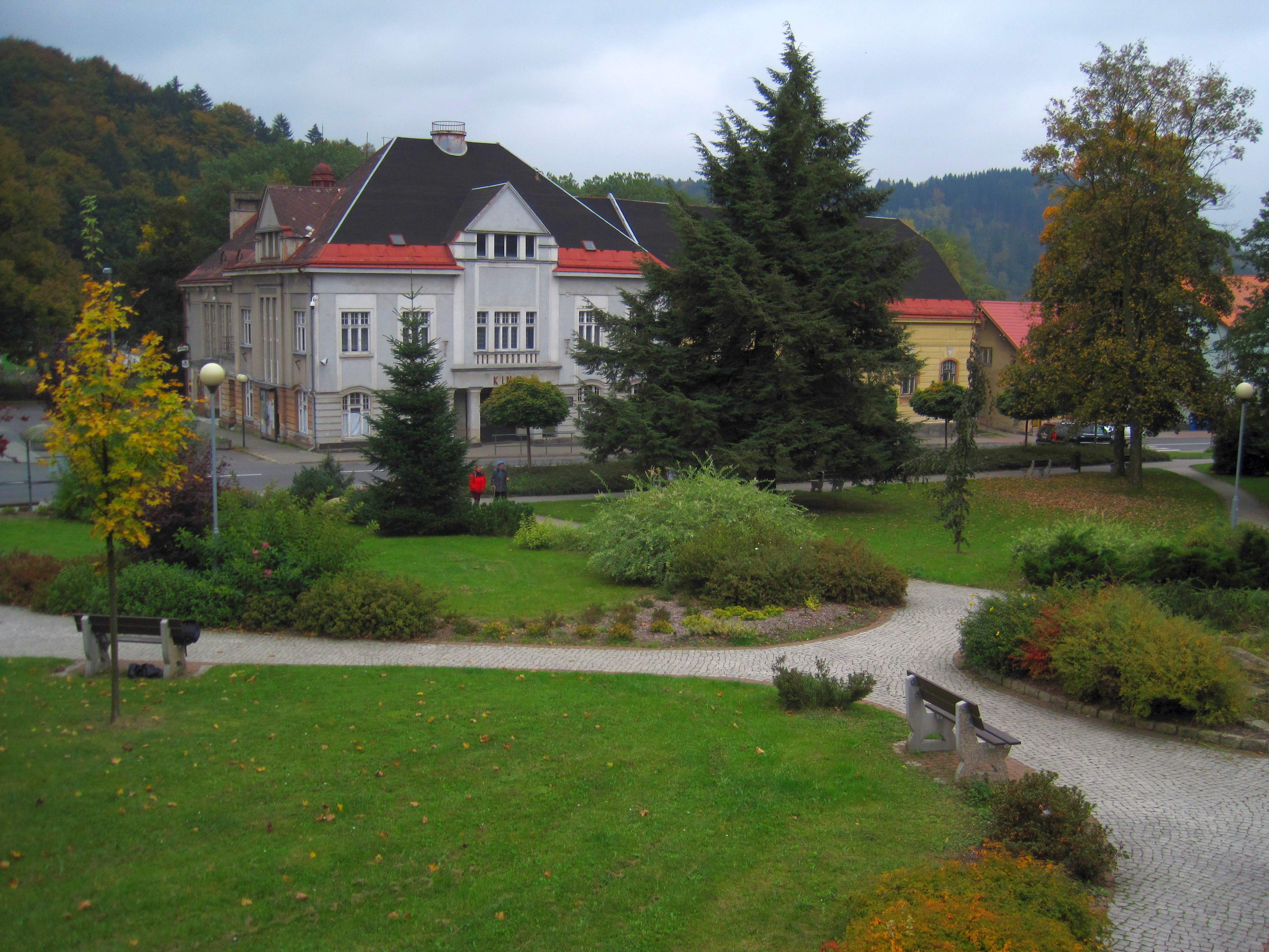 Velké Hamry - náměstí